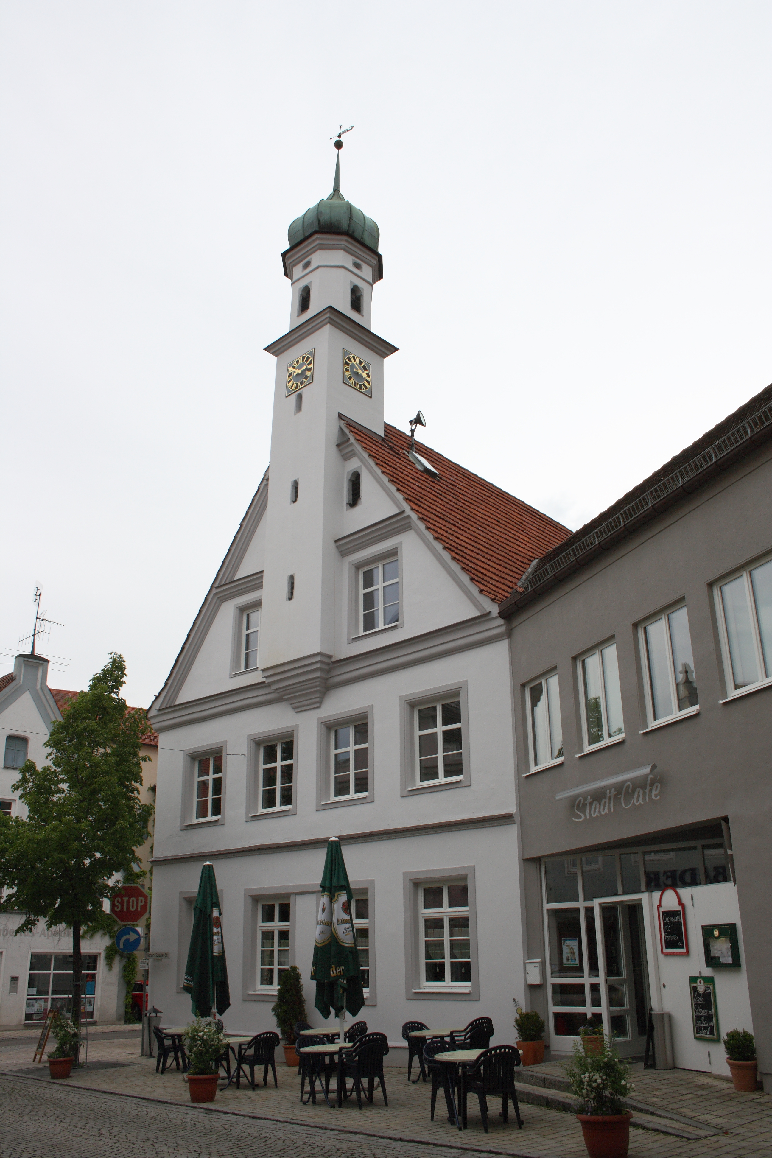 Rathaus in Burgau im Landkreis Günzburg (Bayern), Stadtstraße 6